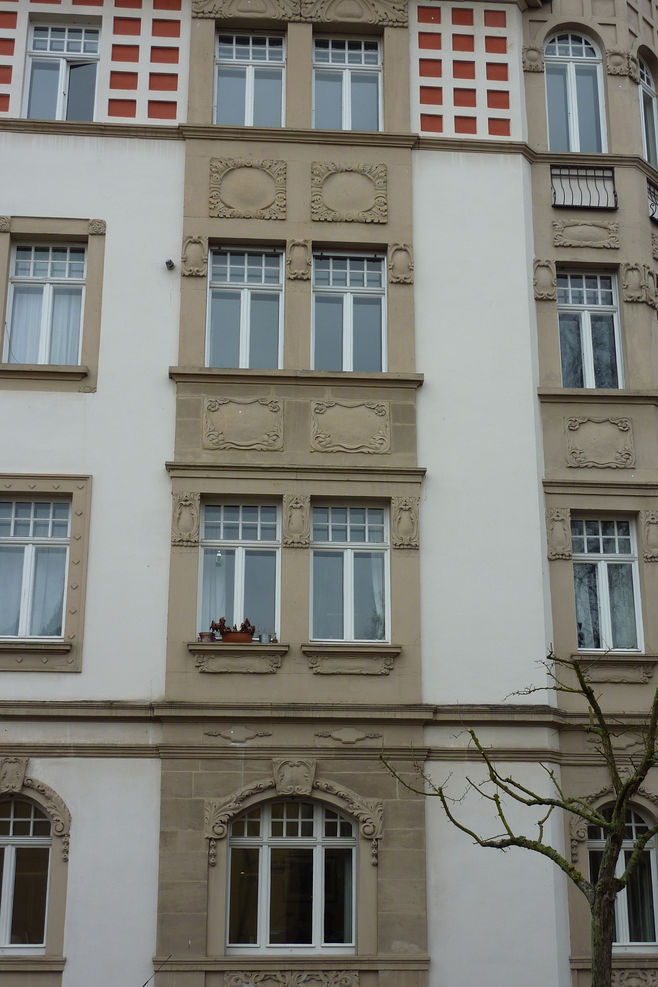 Bamberg, Ottostraße 26, Wohnhaus von Johannes Kronfuß